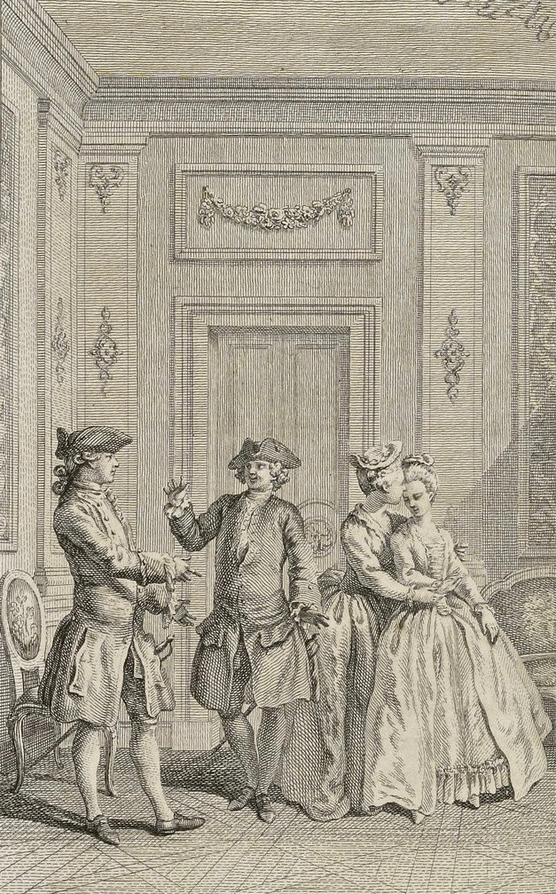 Louis-Joseph Masquelier (1741–1811) nach Hubert-François Gravelot (1699–1773): Illustration zu Pierre-Augustin Caron de Beaumarchais (1732–1799), Eugénie, drame en cinq actes en prose, Akt III, Szene VIII, Merlin, Paris 1767, vor S. 55. Bibliothèque nationale de France.